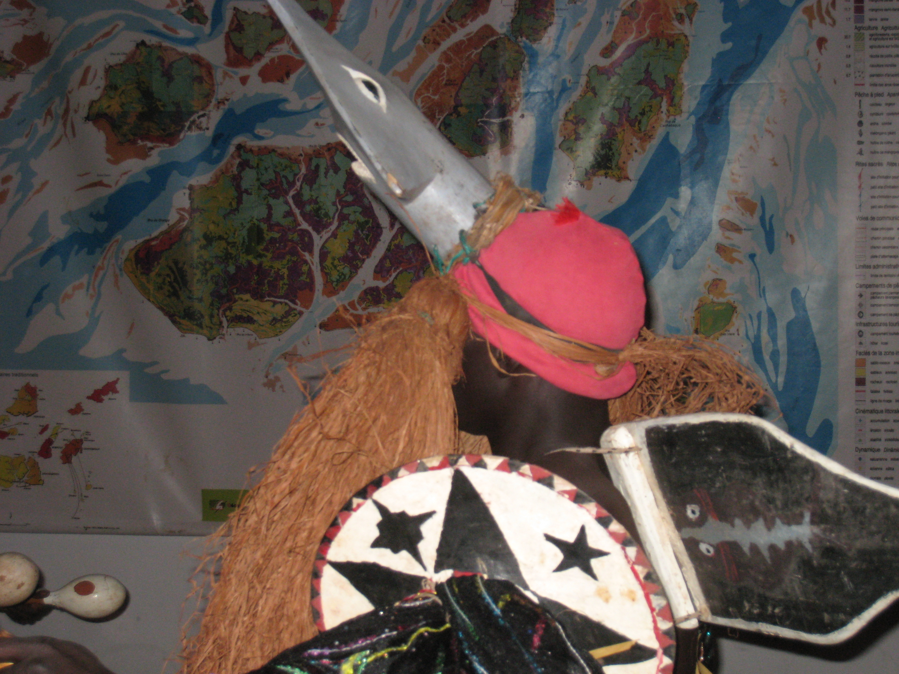 danse de bienvenue This is an image of Cultural Fashion or Adornment from Guinea-Bissau